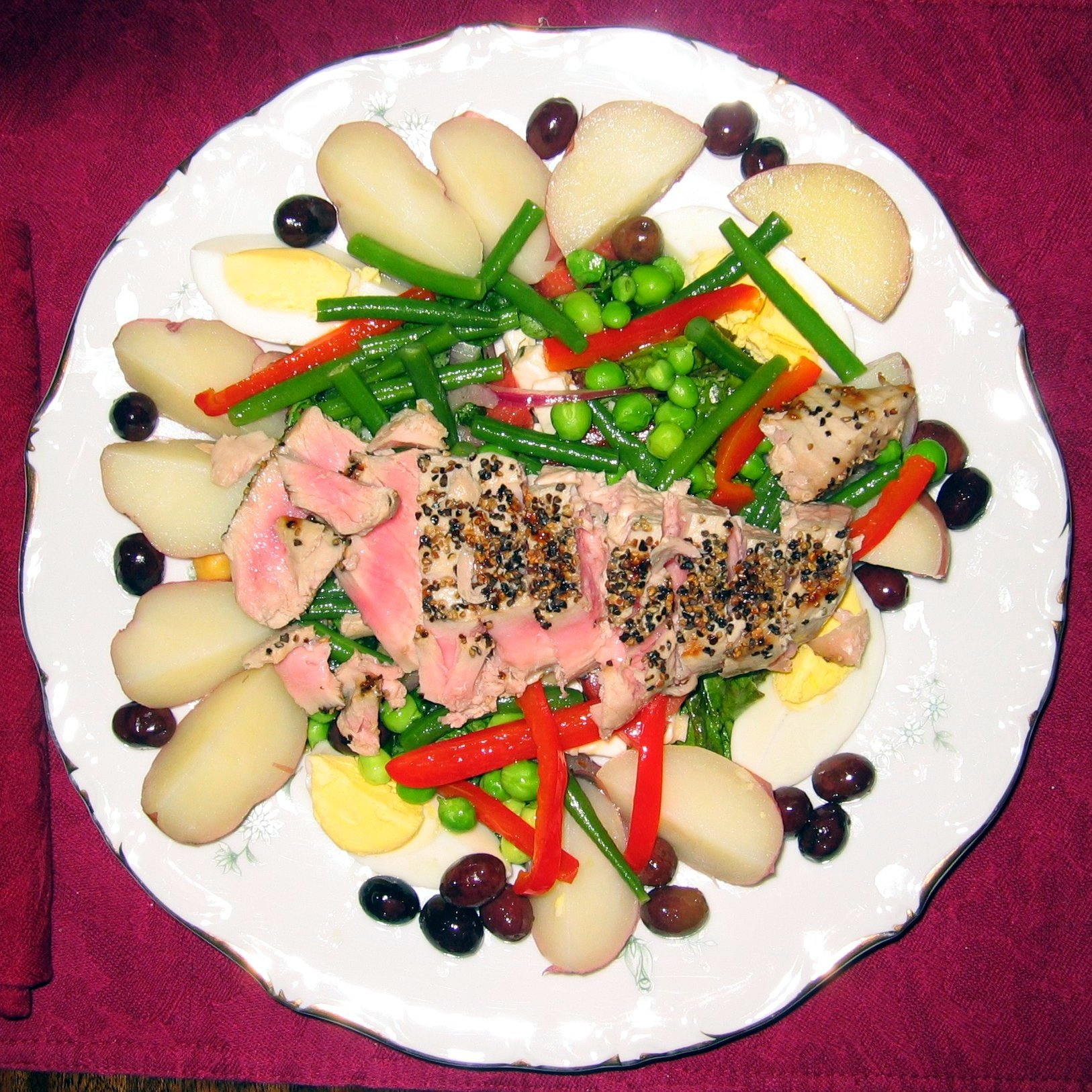 Salade nicoise